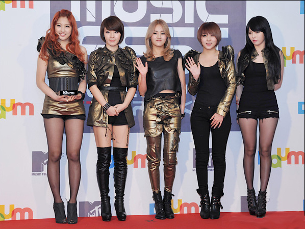 MTV-DAUM 뮤직 페스트에 참가한 그룹 ‘포미닛(2minute)’